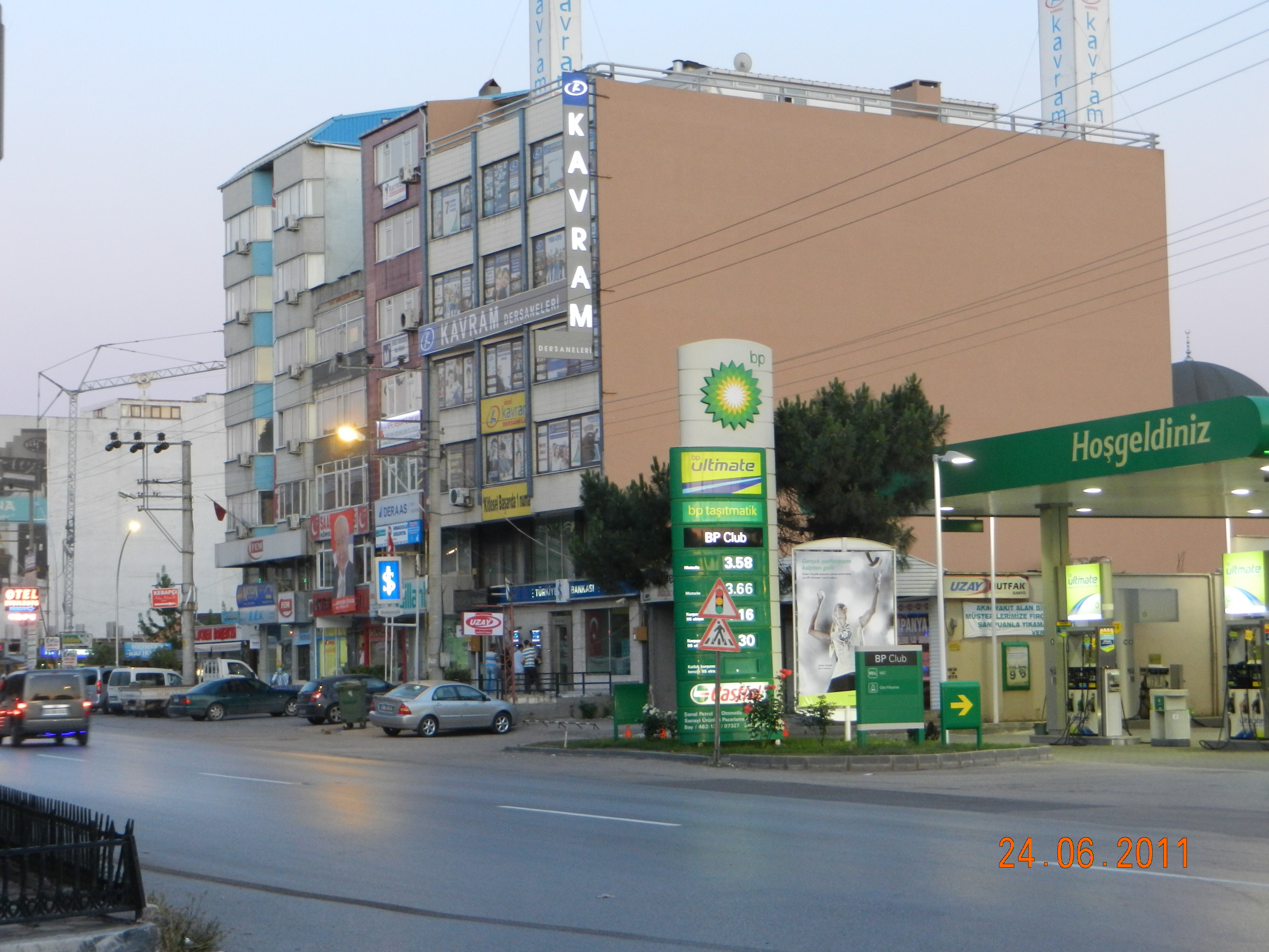 Tilkiler İş Merkezi